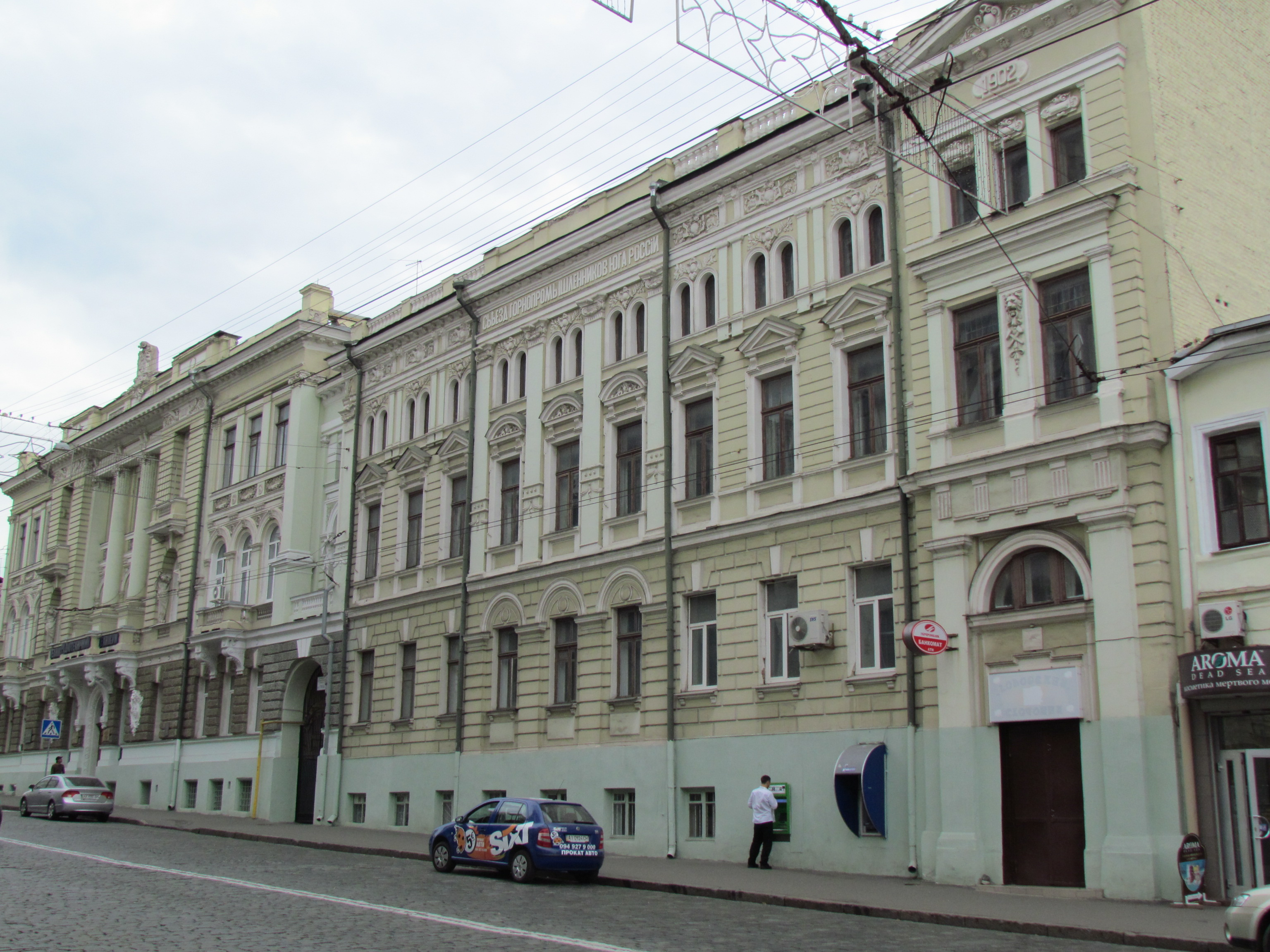 Україна, Харків, вул. Сумська, 18-20